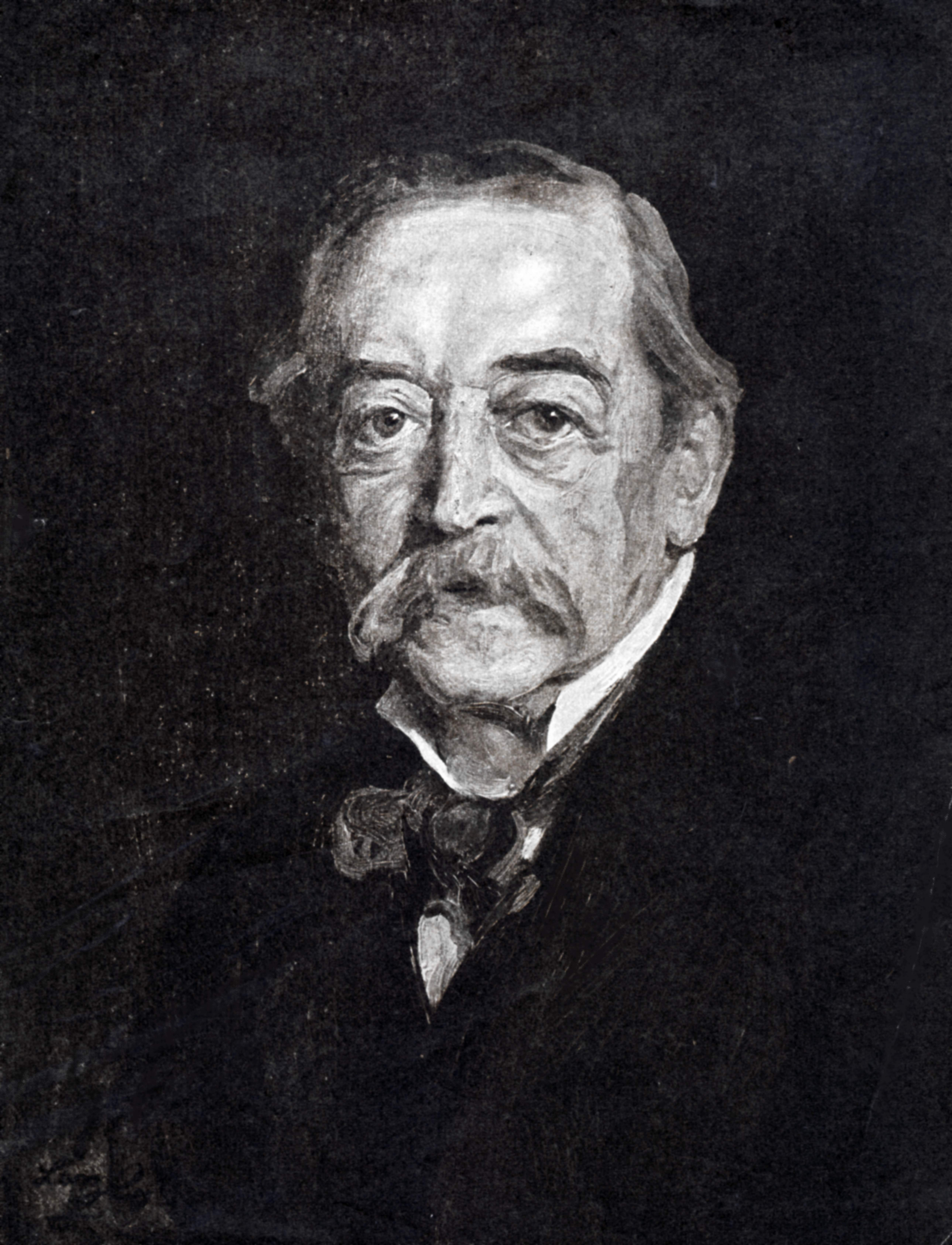 Fotografie eines Ölporträts von Otto von Kühlmann.